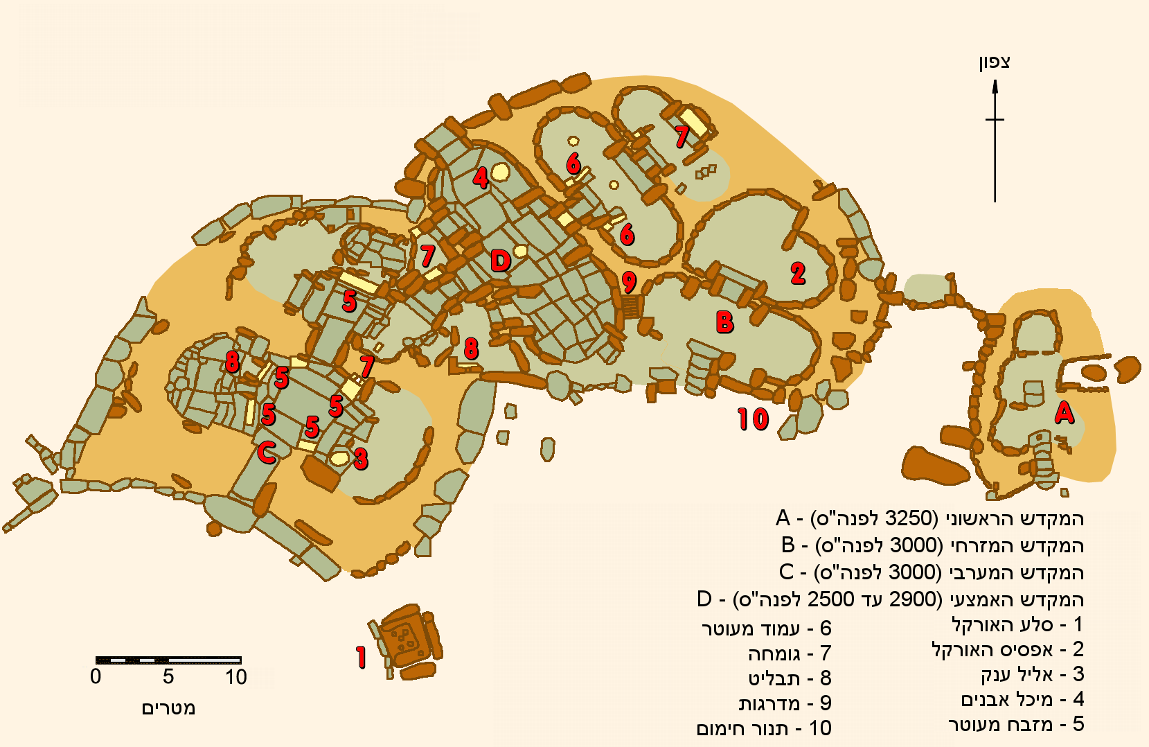 Plan des temples de Tarxien